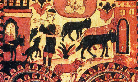 Прялка расписная. Деталь. 1-я половина XIX века. Северная двина, Борок